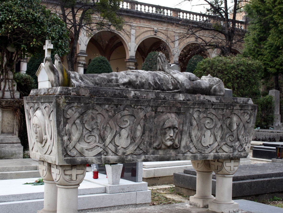 djelo Mirka Račkog na grobu obitelji Tarnik na Mirogoju, Zagreb, Hrvatska